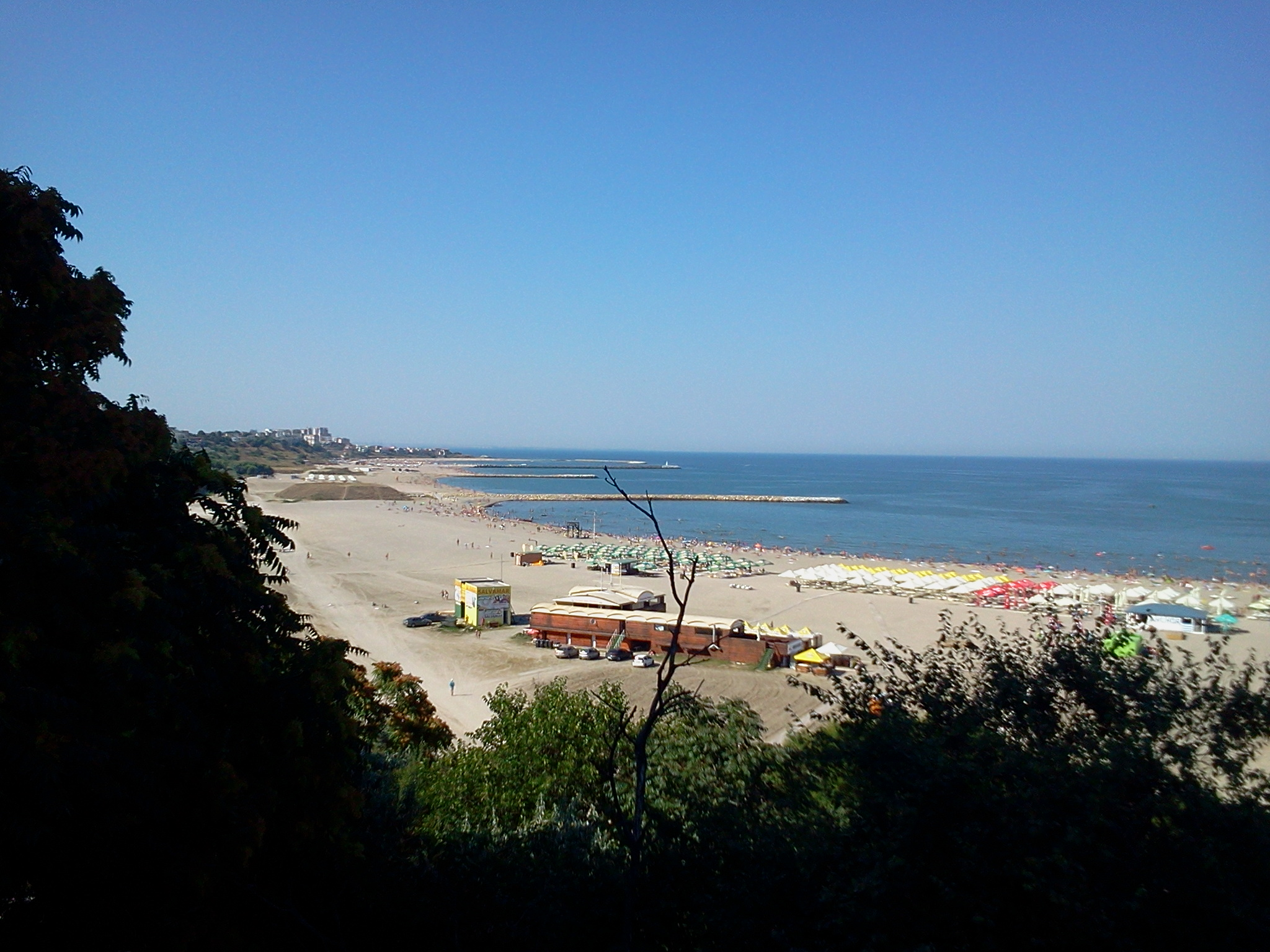 Constanța 2017: plaja "Modern"